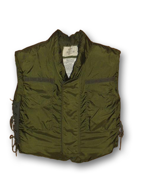 amerikanische "Flack Jacket" M69 aus dem Vietnamkrieg (US-Army)